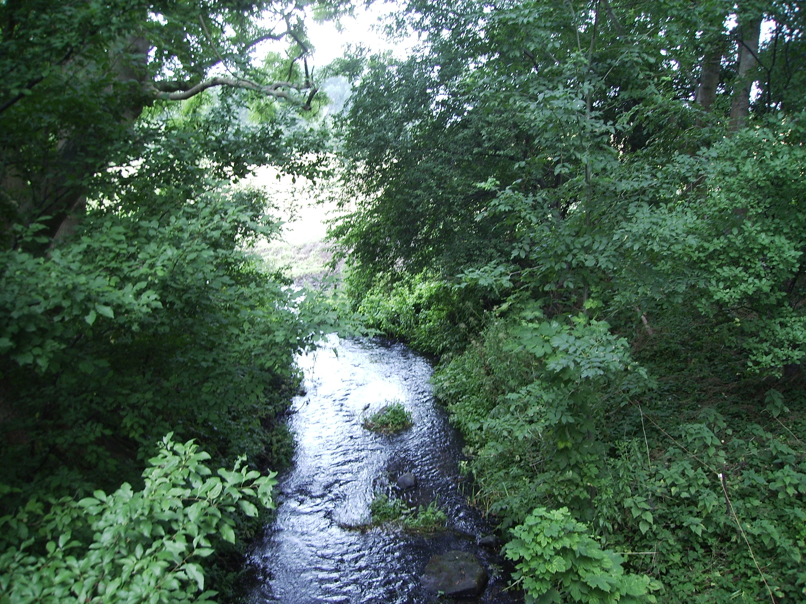 Vejrup Å, Denmark (Danish River) - Vejrup Å ved broen mellem Åsum og Marslev